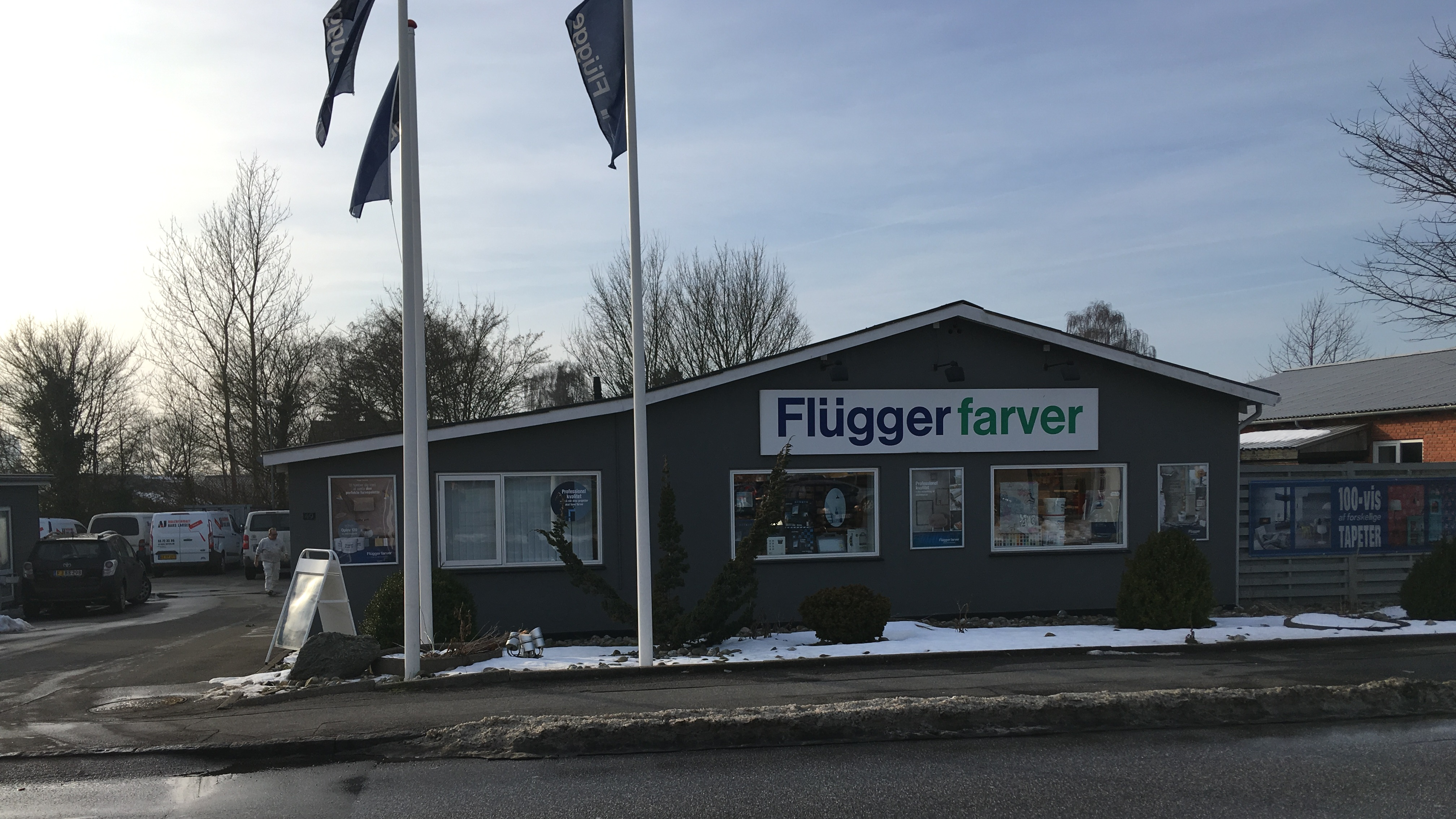 Den danske farveforretning Flüggers butik i Næstved på Erantisvej.